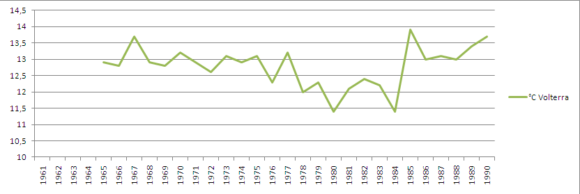 Stazione meteorologica di Volterra: andamento della temperatura media annua dal 1961 al 1990.